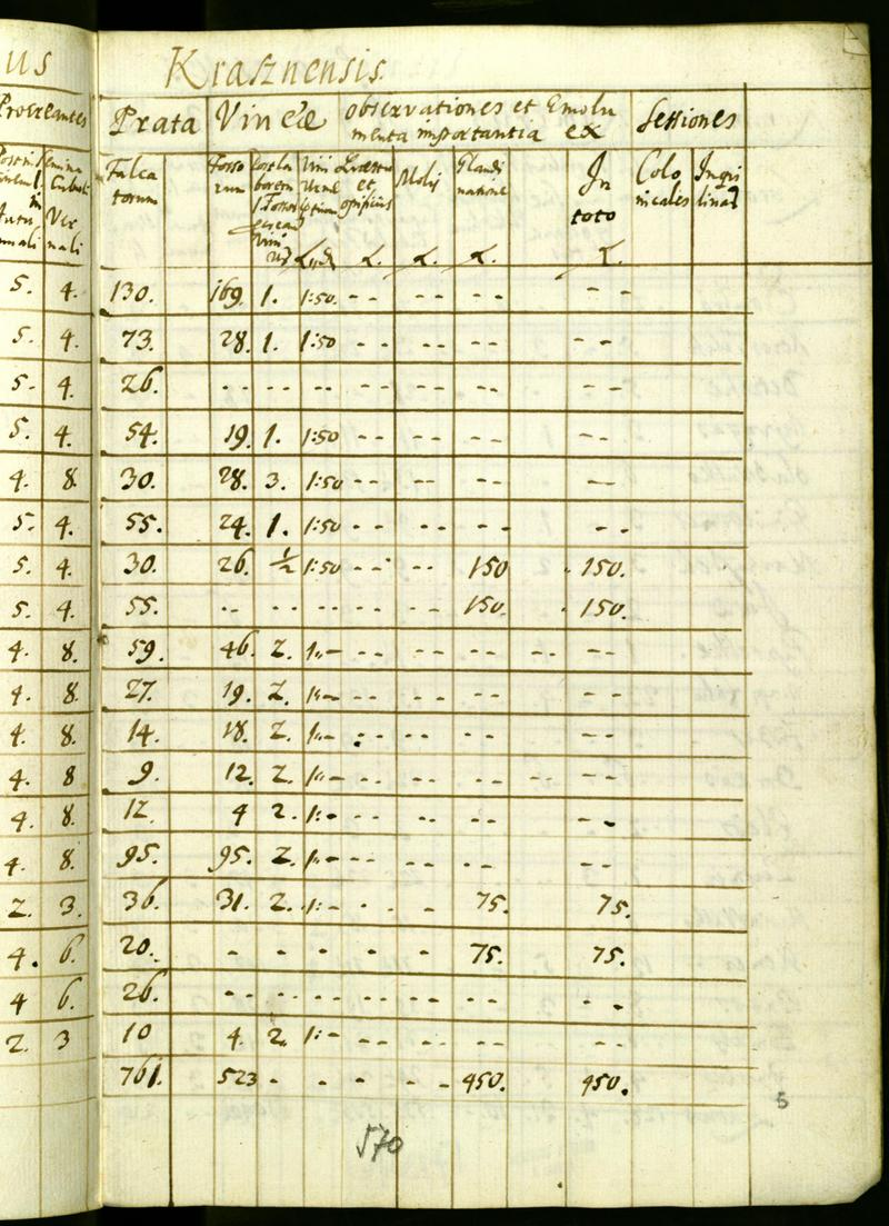 Census 1715 in Giurtelecu Simleului 4